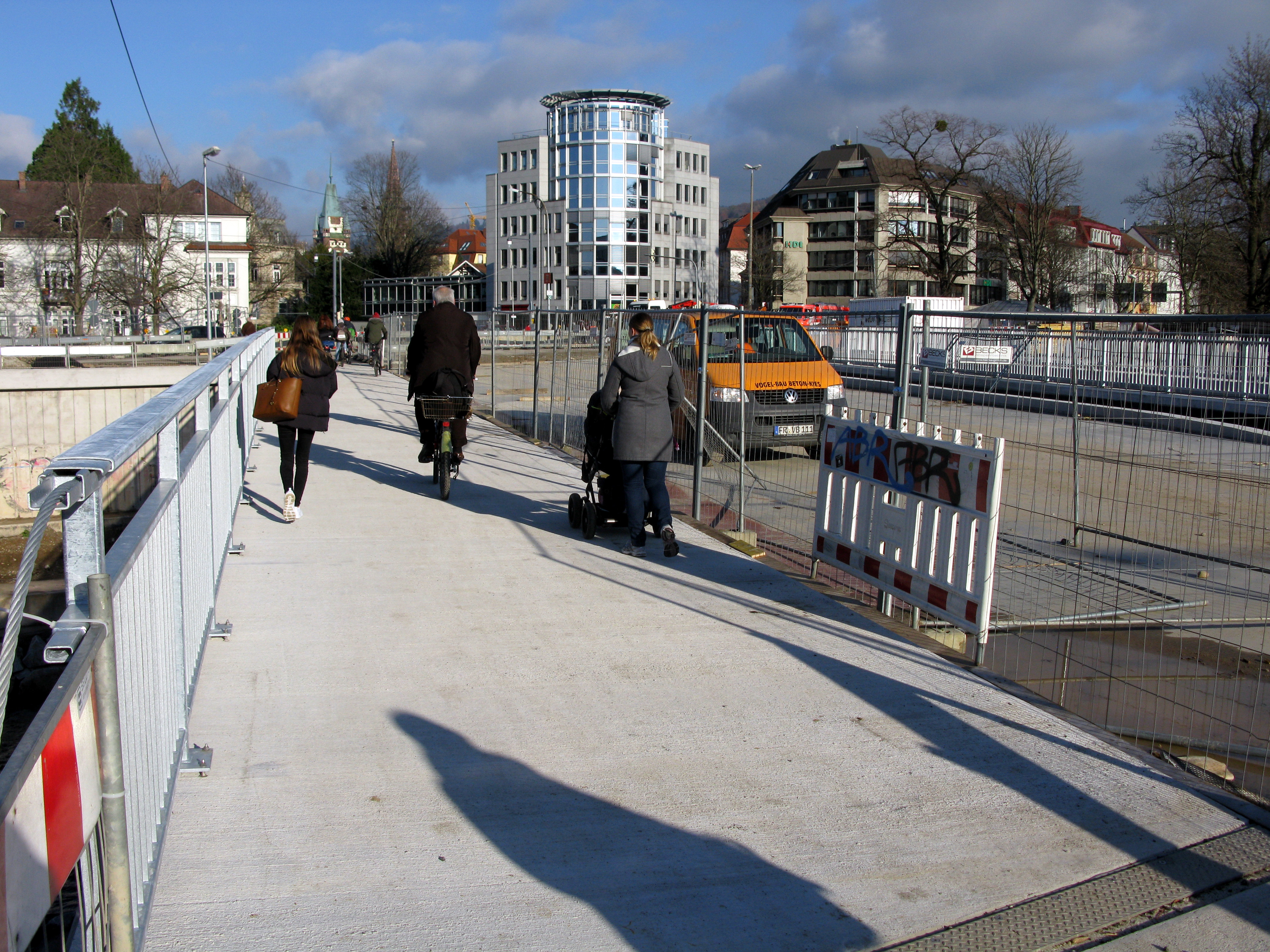 Fußgänger und Radfahrer dürfen schon die neue Kronenbrücke in Freiburg auf der Westseite benutzen